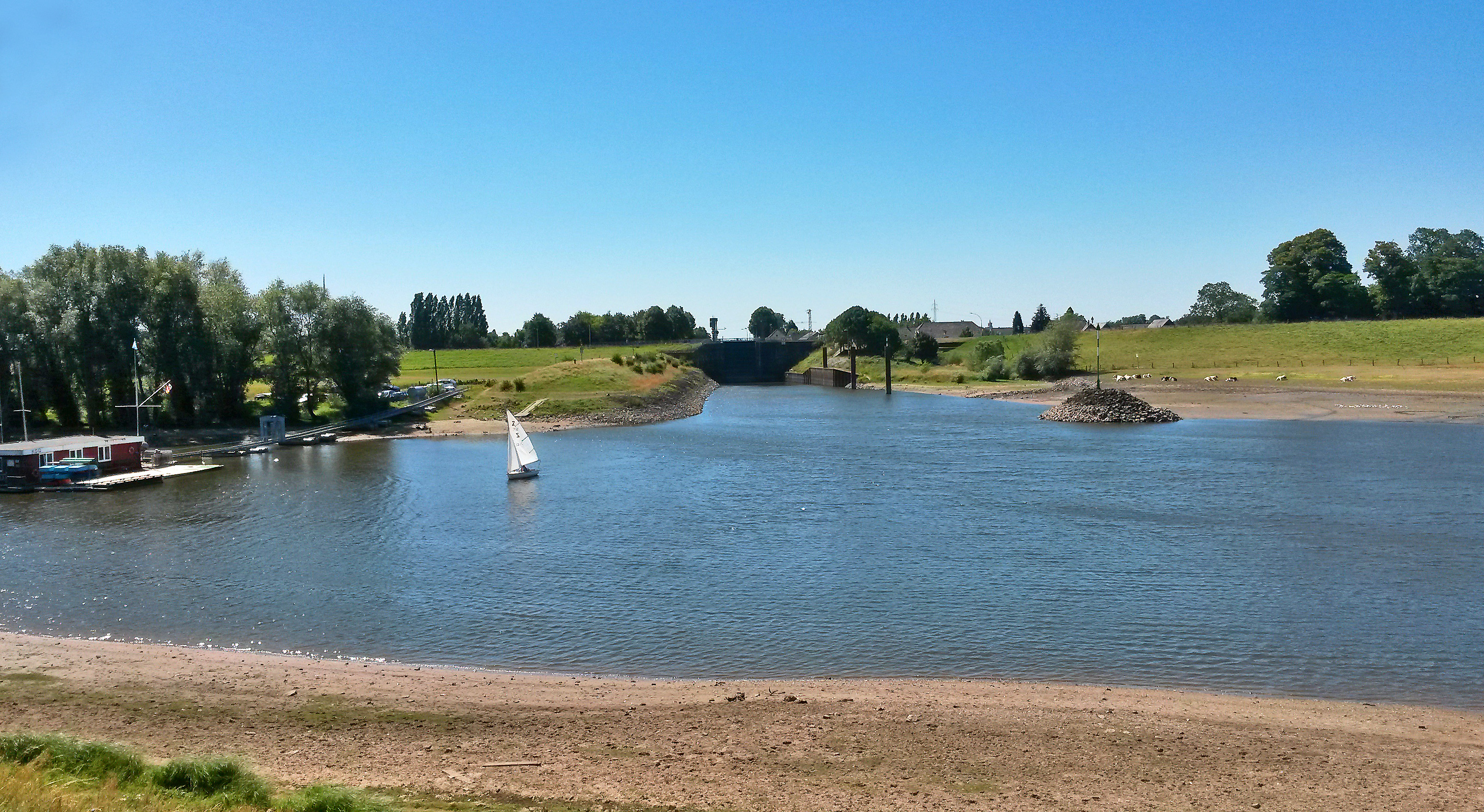 Kleve, Griethauser Altrhein mit Spoyschleuse bei Brienen / Wardhausen (Juli 2018)